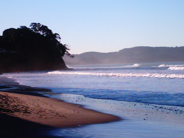 Red Beach, Auckland, New Zealand